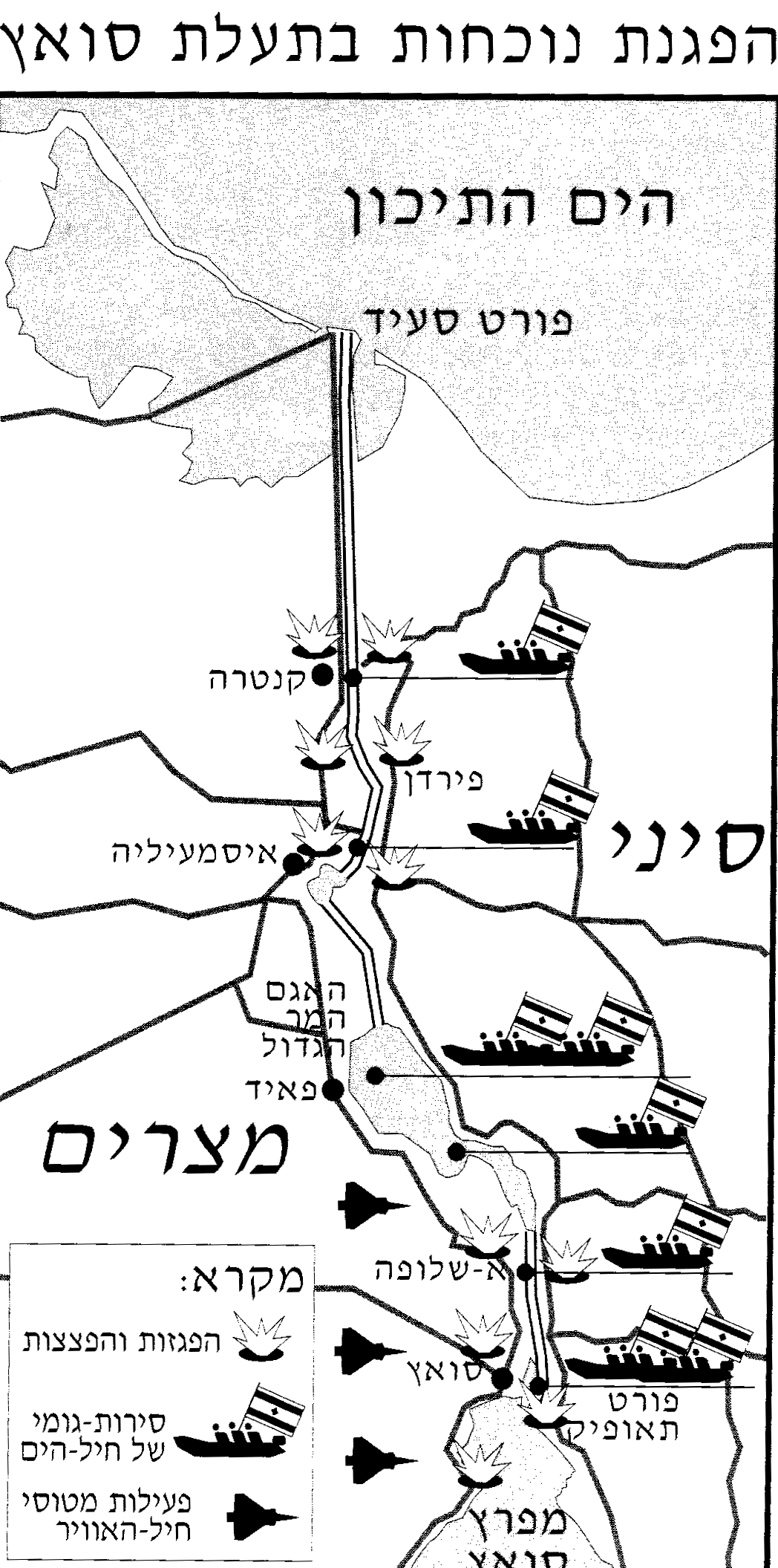 1967 פרישת סירות הדגל בתעלת סואץ, 14 יולי